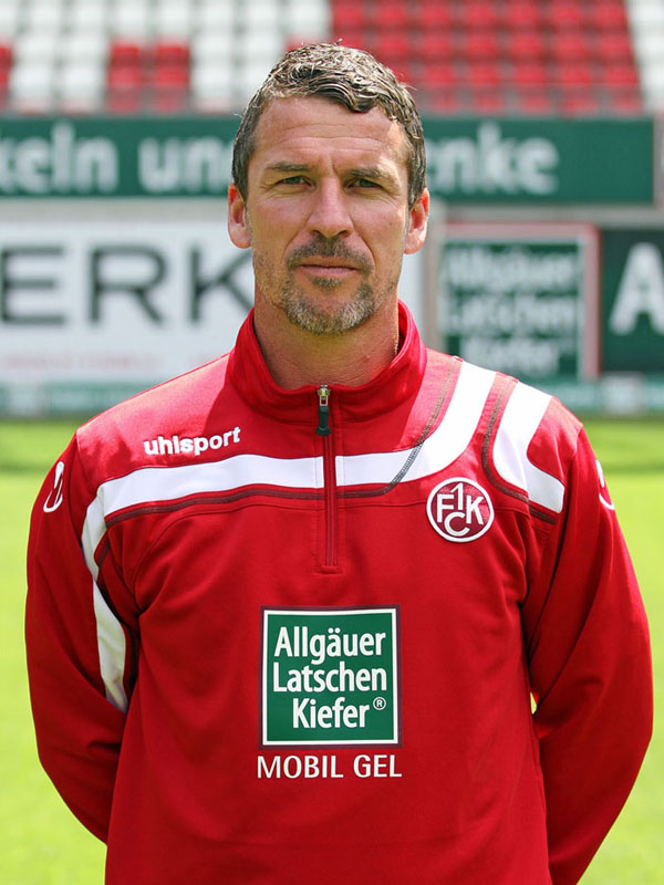 Marco Kurz, Cheftrainer des 1. FC Kaierslautern